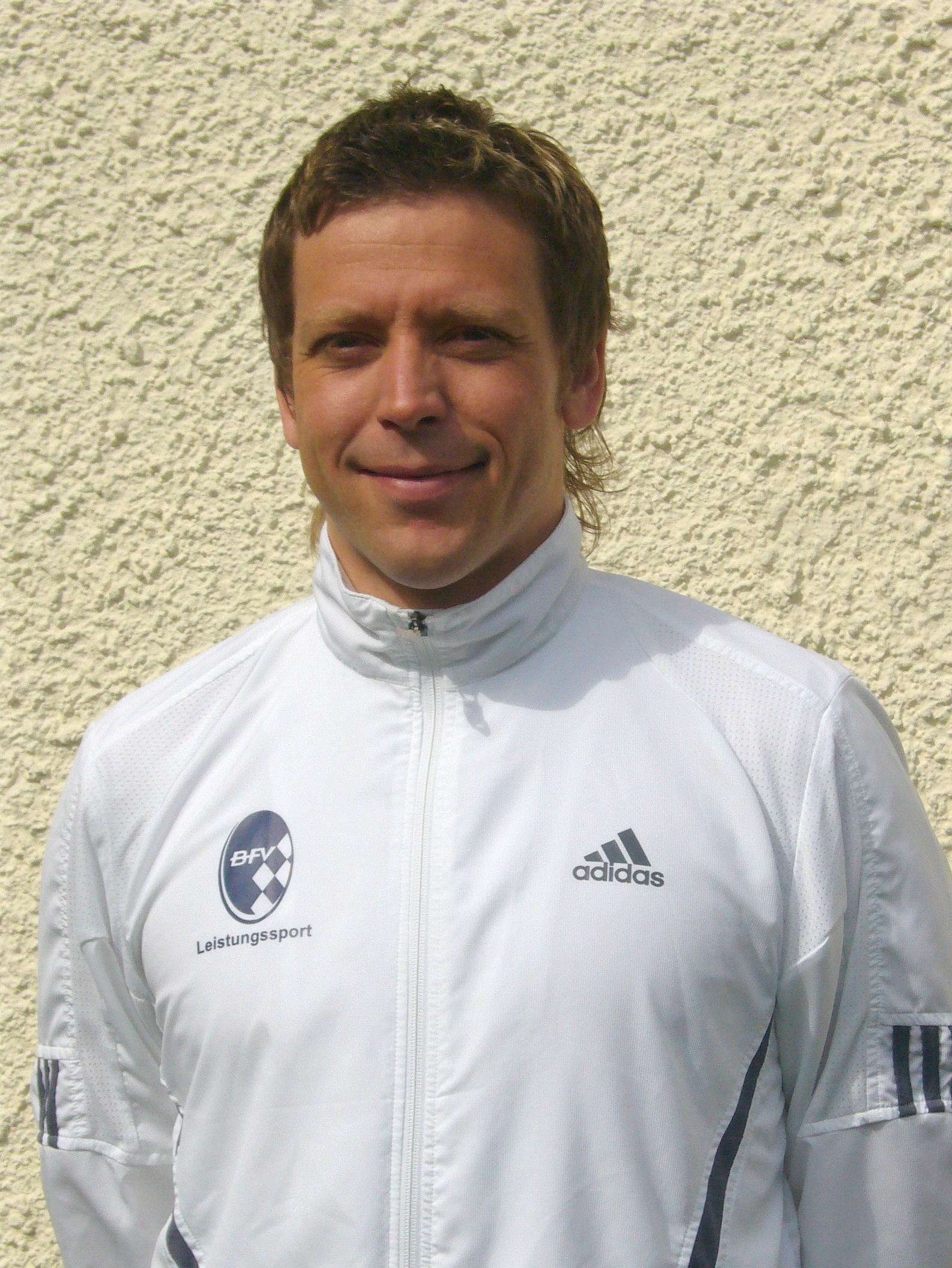 Privat